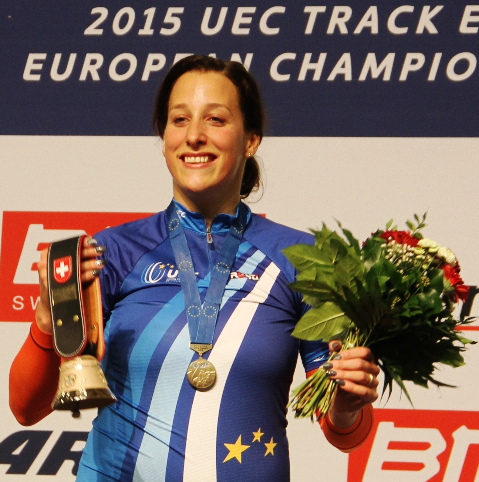 Elis Ligtlee, niederl. Radsportlerin, Europameisterin im Sprint The making of this document was supported by the Community-Budget of Wikimedia Germany.